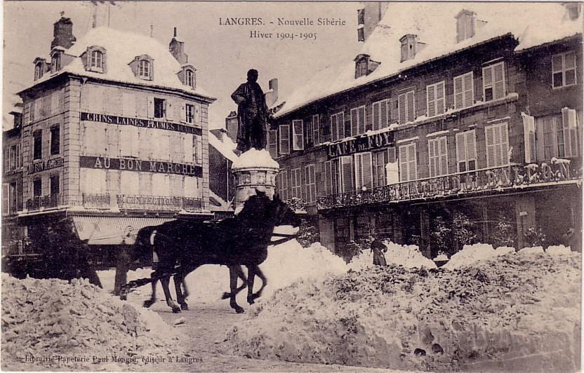 Le n° 9 de la place Diderot, dans le centre-ville enneigé de Langres en Haute-Marne (surnommée la « Petite Sibérie ») durant l’hiver 1904-1905. En arrière-plan de la statue de Denis Diderot, à droite, la maison de naissance en 1685 du philosophe.